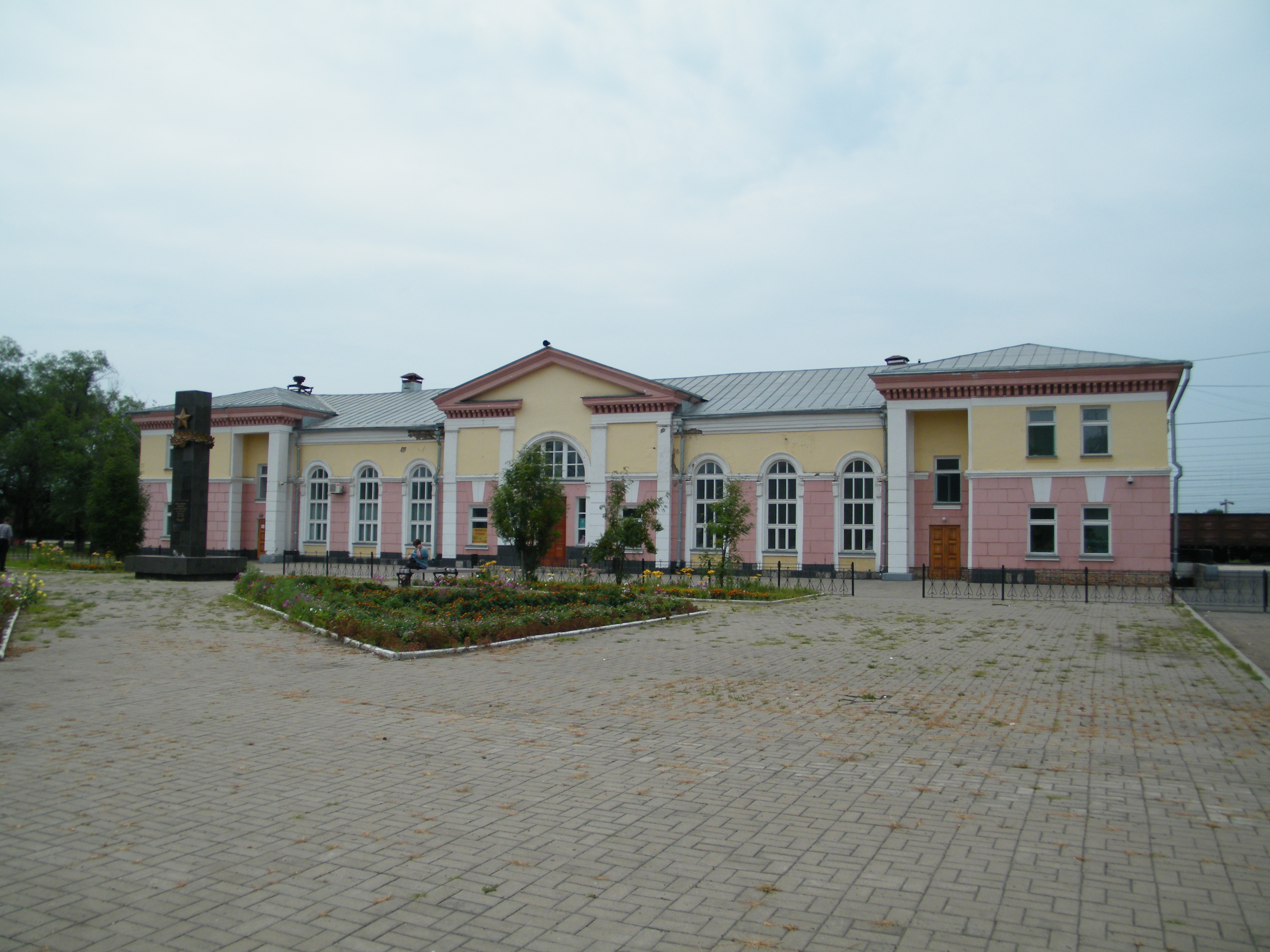 Город Бикин, Хабаровский край. Железнодорожный вокзал.